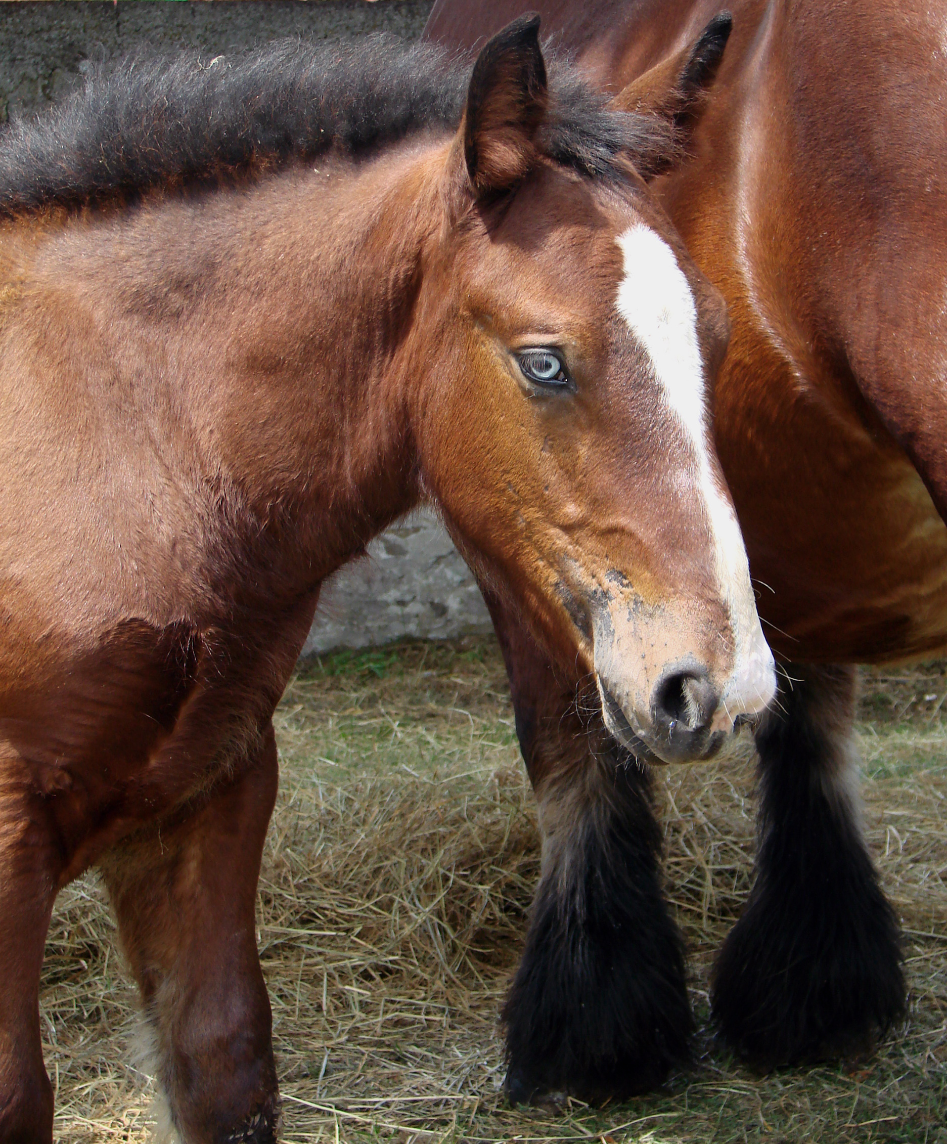 Poulain de race ardennaise.Ses yeux bleus sont une bizarrerie.